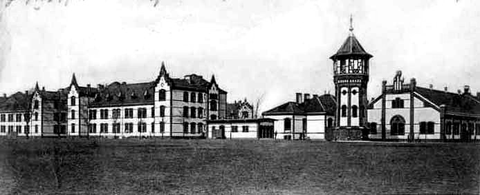 Neue kaserne des Schleswig-Holsteinischen Infanterie-Regiments Nr. 163, spätere Sick-Kaserne in Neumünster